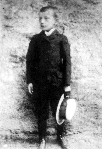 Asi pětiletý Vlasta Burian. Vyfoceno ještě v Liberci. Licensing Obrázek byl vyfocen kolem roku 1896 a autorem je Burianův otec Antonín Burian, který zemřel v roce 1928. (Zdroj: Ondřej SUCHÝ: Vlasta Burian - Na cestě do 21. století)